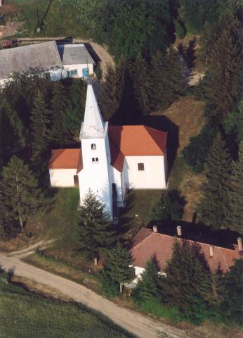 Csatár, temple, Hungary, aerial photography. Szeplőtelen Fogantatás római katolikus templom